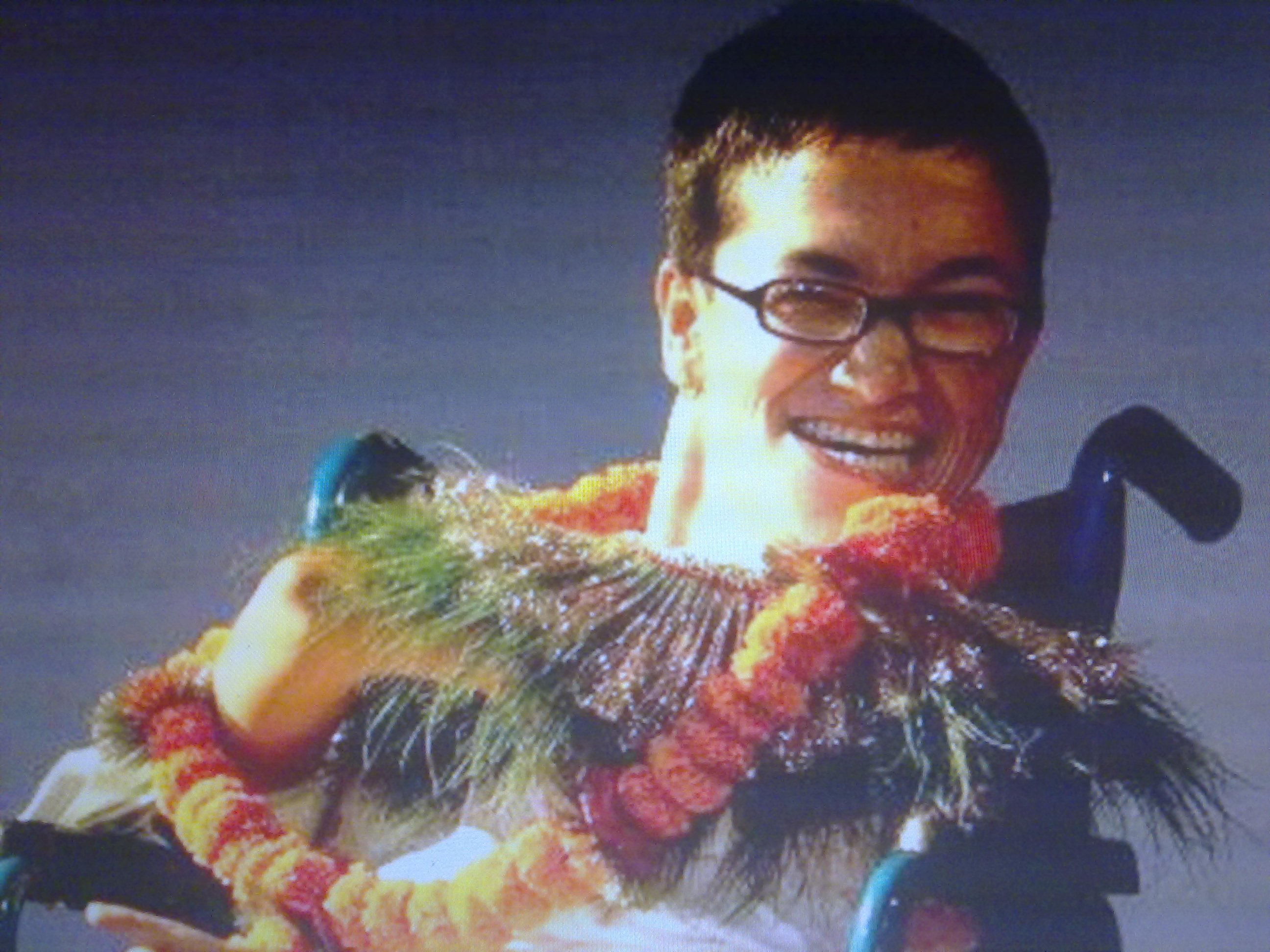 नेपाली: यो फाइल मैले N 79 mobile क्यामेराले खिचेको हो